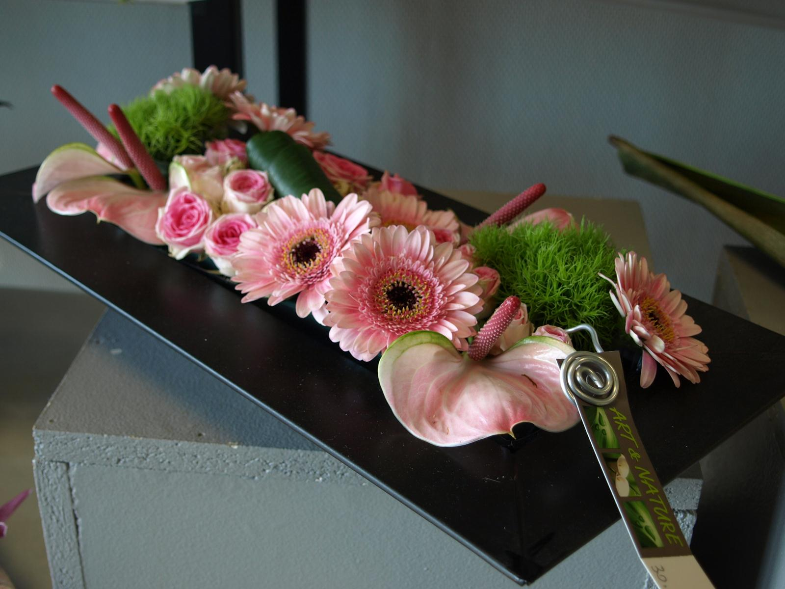 Creation Florales